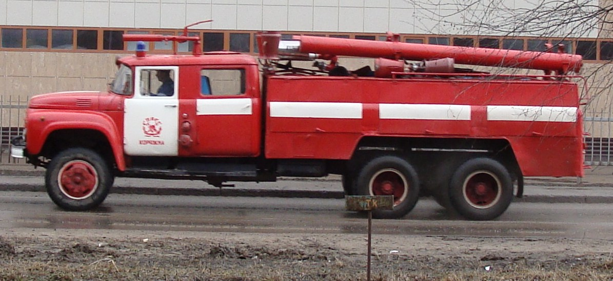 Автомобиль воздушно-пенного тушения на базе цистерны АЦ-40(133Г)-181. "СПАСС", Коряжма